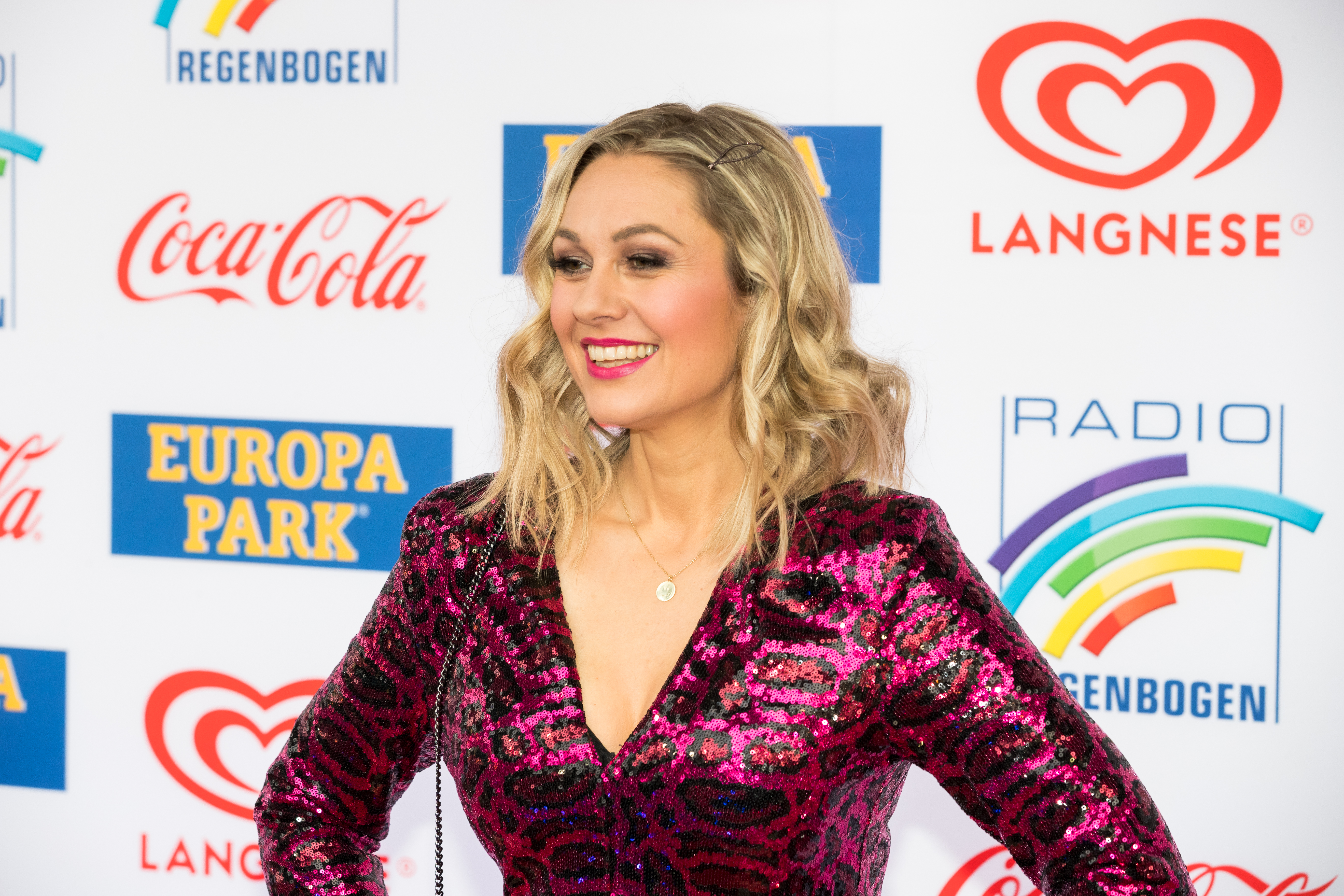 Ruth Moschner during Radio Regenbogen Award 2019 at Europapark, Rust, Baden-Württemberg, Germany on 2019-04-12, Photo: Sven Mandel